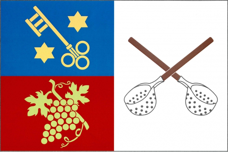 vlajka, Mikulovice, okres Znojmo